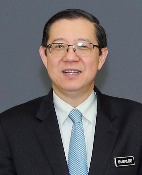 Menteri Kewangan Malaysia, Lim Guan Eng